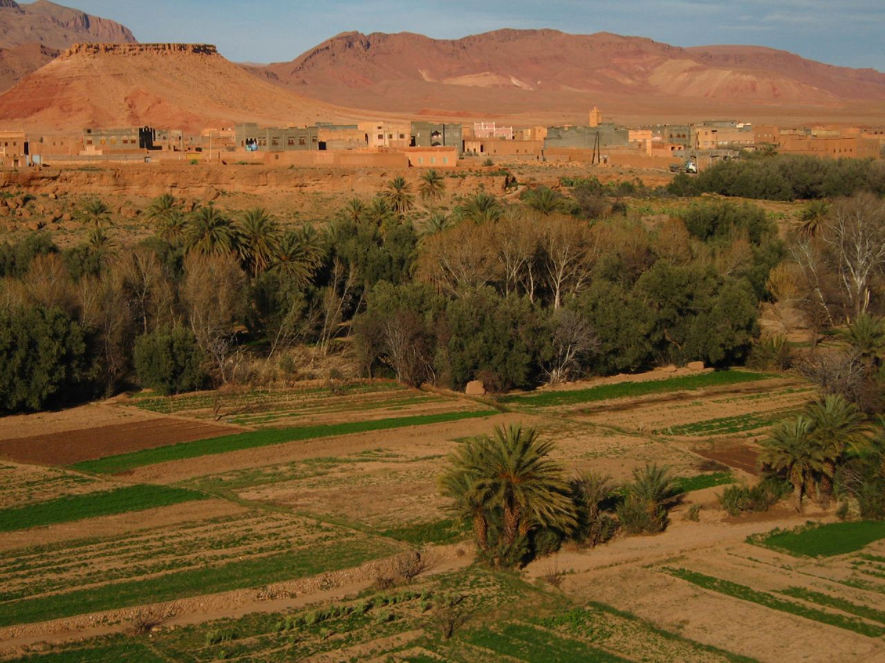 Erfoud, Tafilalt region, Morocco